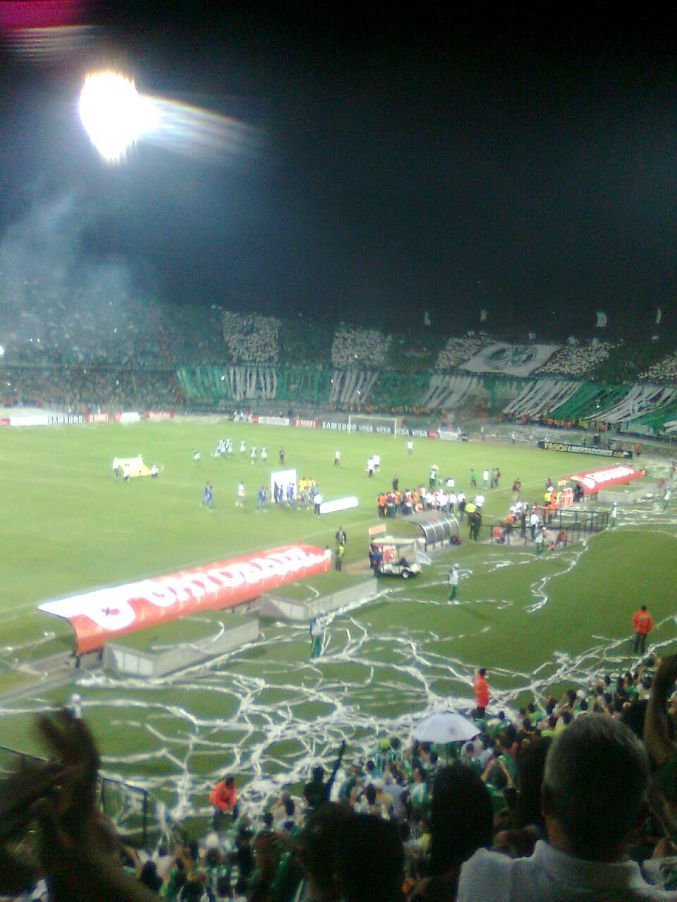 Imagen de la hinchada de Atlético Nacional